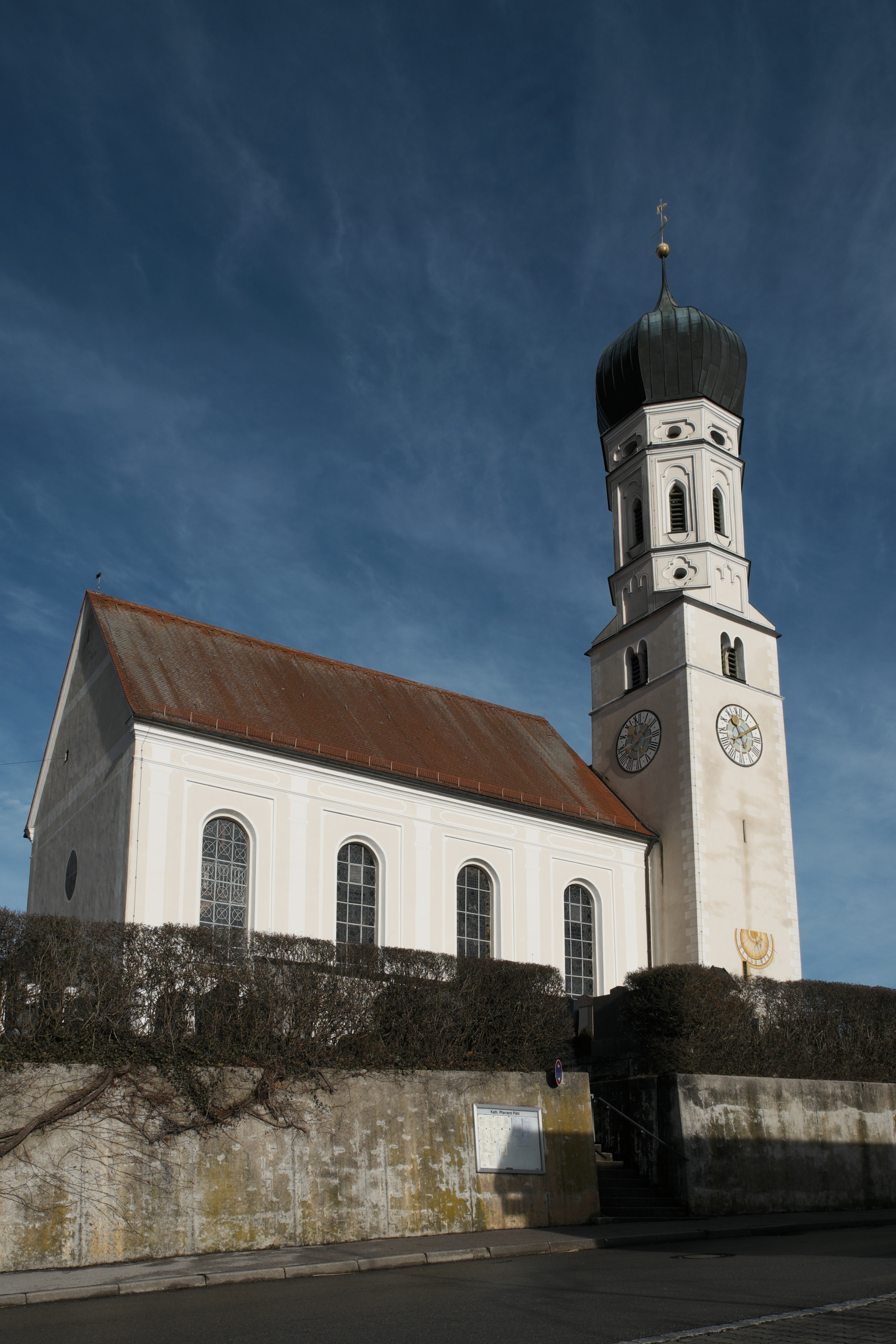 Katholische Pfarrkirche St. Laurentius in Pähl im Landkreis Weilheim-Schongau (Bayern/Deutschland), Südseite